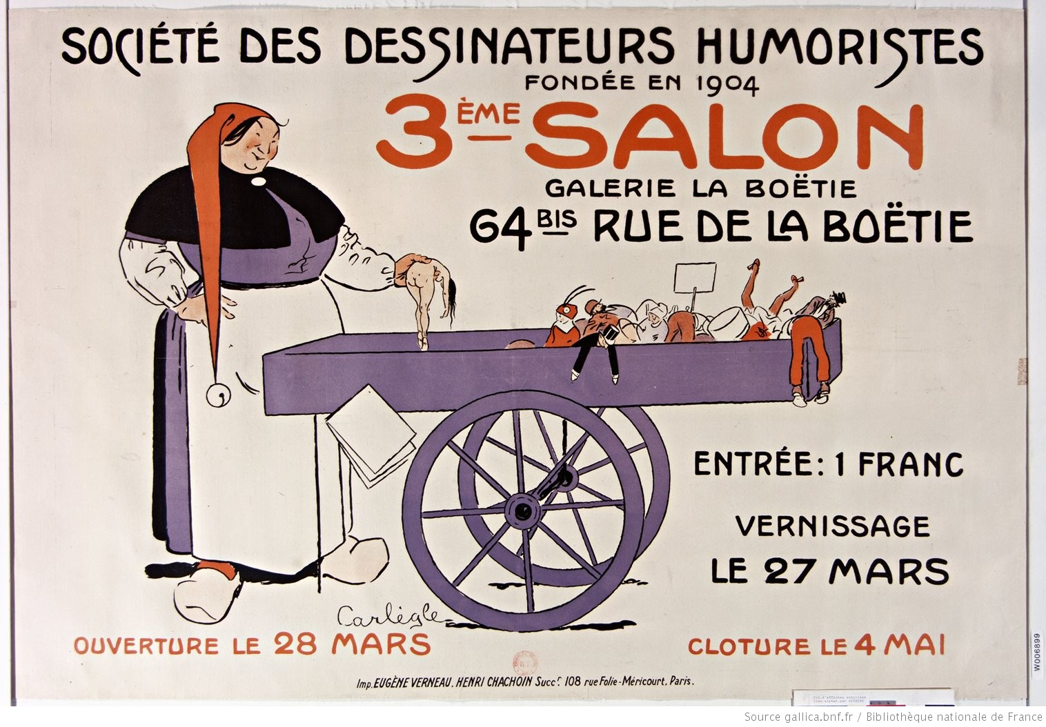 Affiche du 3ème salon de la Société des Dessinateurs Humoristes, Galerie de la Boétie, Carlègle, Charles-Émile; lithographie en couleur 79 x 119 cm